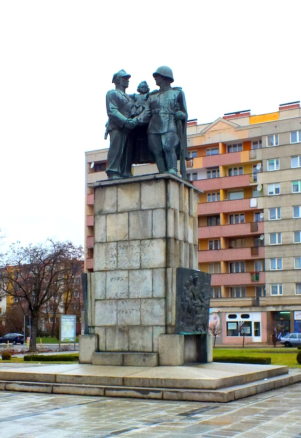 Legnica, pomnik wdzięczności dla Armii Radzieckiej